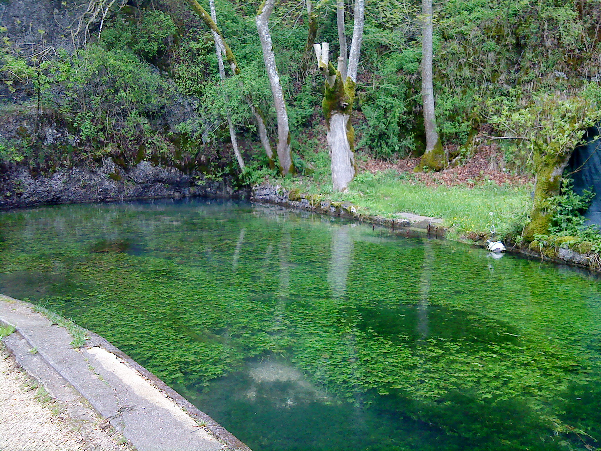 Der Quelltopf der kleinen Lauter